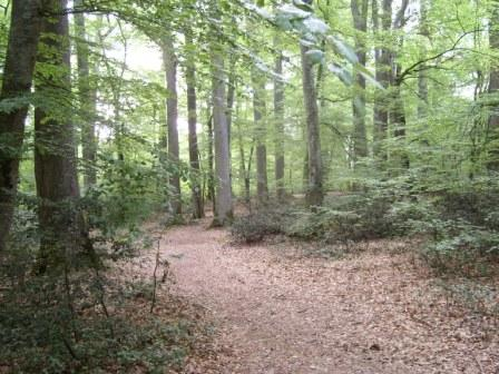 foret de troncais 2007